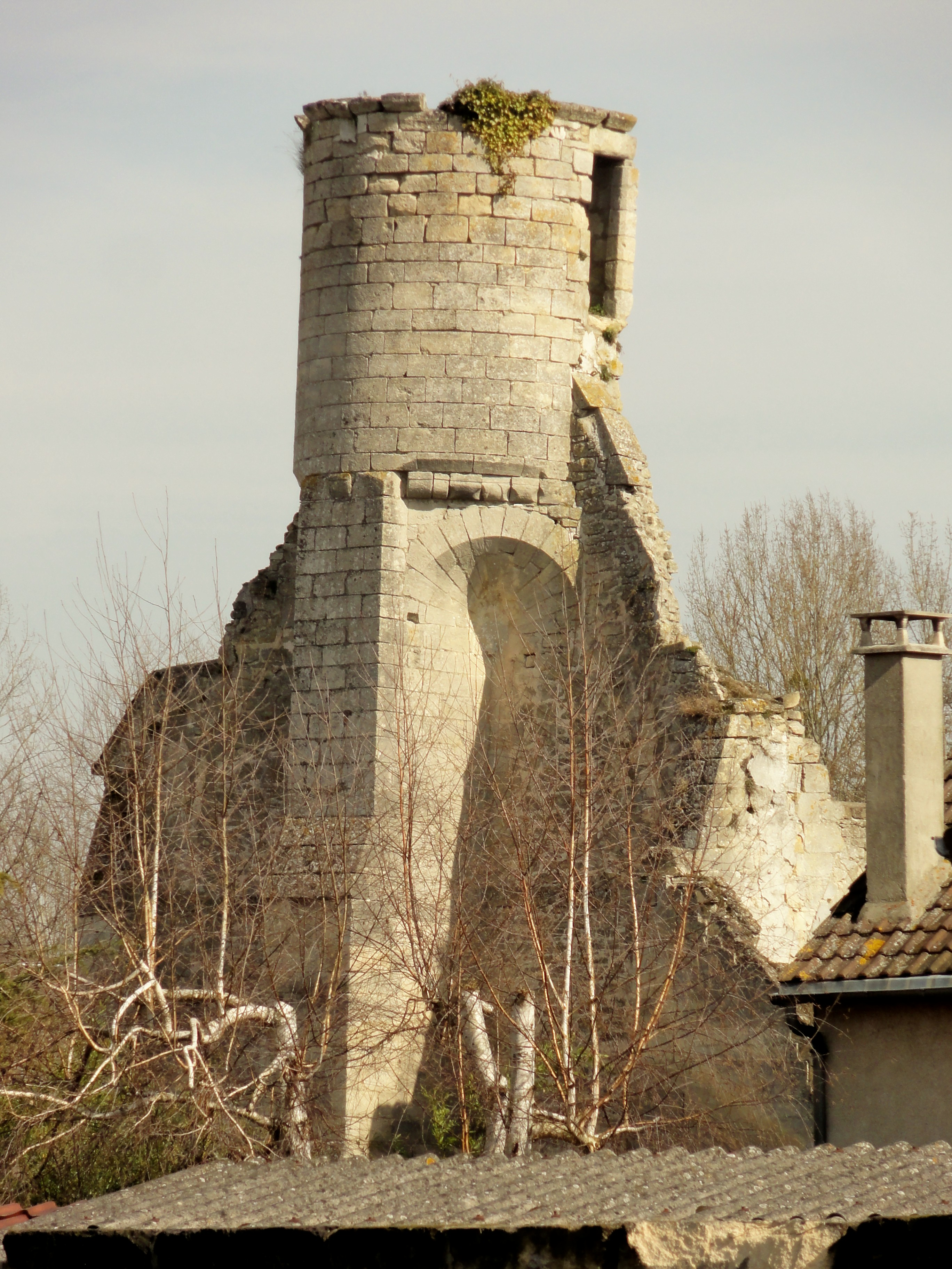 Tour de guet sur le contrefort central du pignon occidental, avec deux trompes.